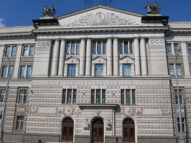 Фасад Минского военного Суворовского училища по ул. М.Богдановича